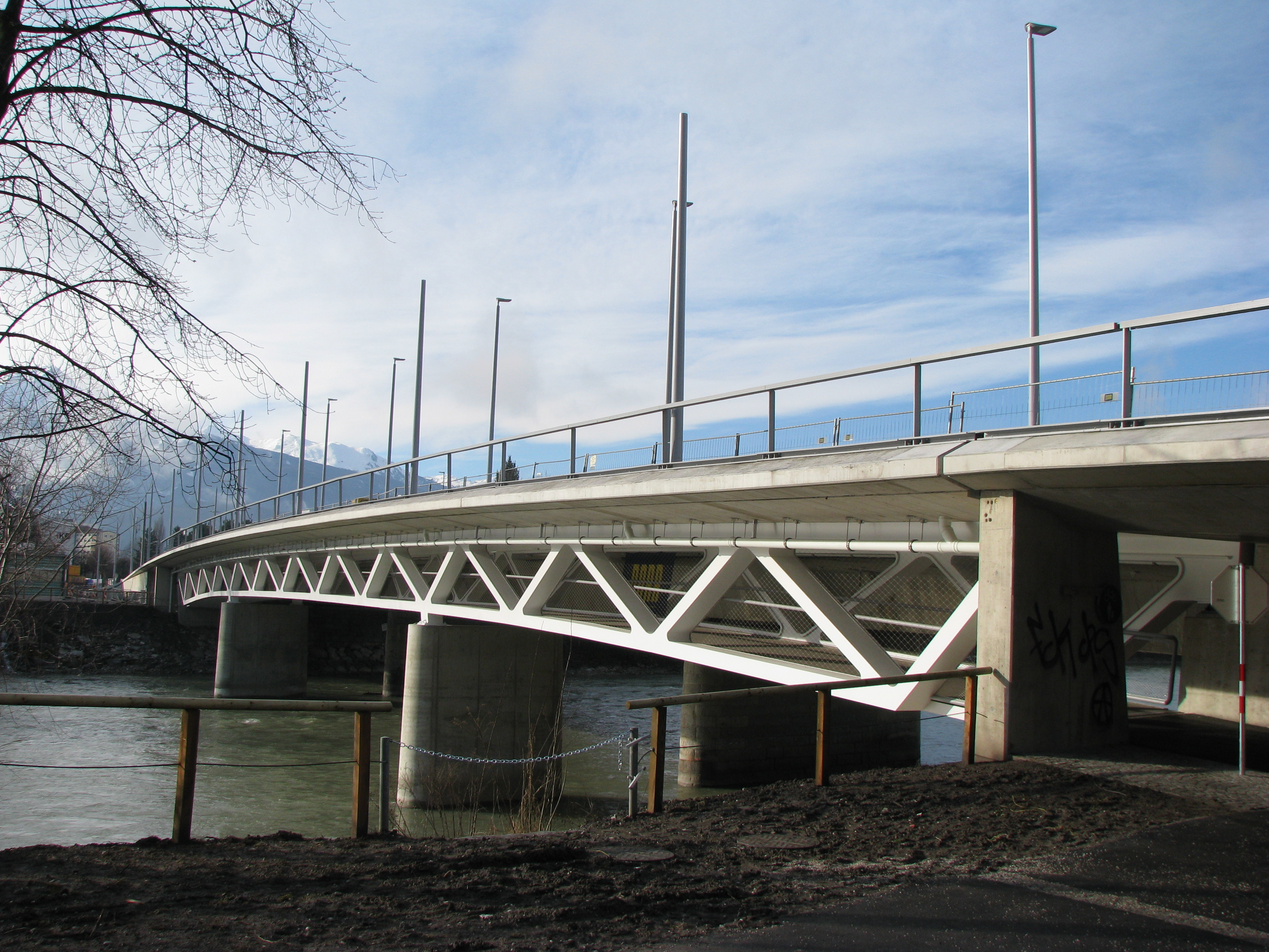 Innsbruck, Grenobler Brücke (Straßenbahn- und Fußgängerbrücke) von Südosten